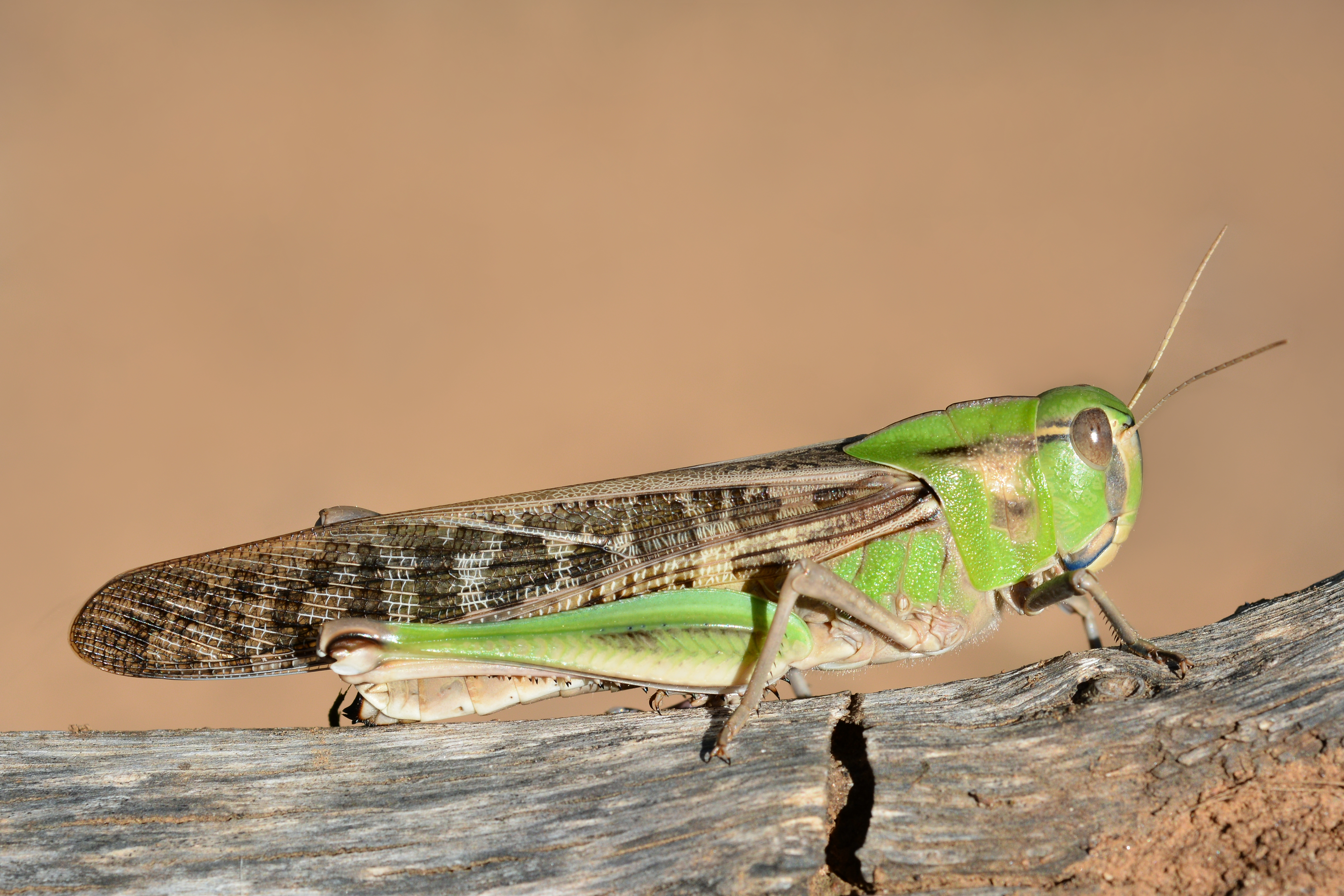 Locusta migratoria